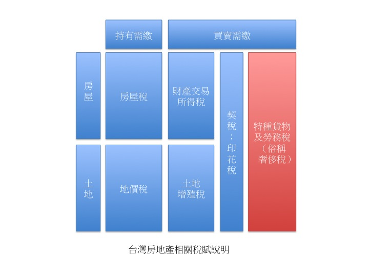 在台灣房地產的相關稅賦大約可以一個二乘二的方式來呈現，依照這四個象限，有不同的稅賦原因。